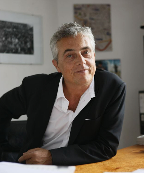 ritratto Stefano boeri